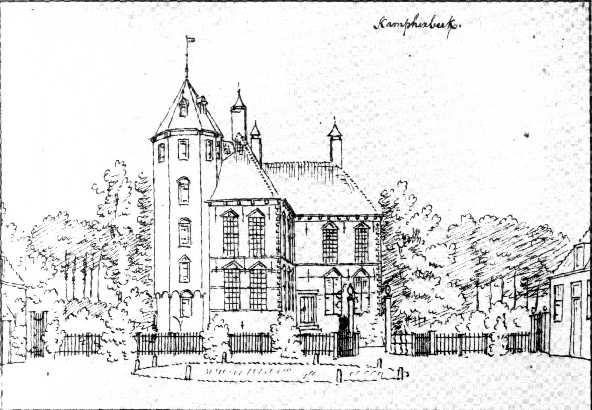 Campherbeek